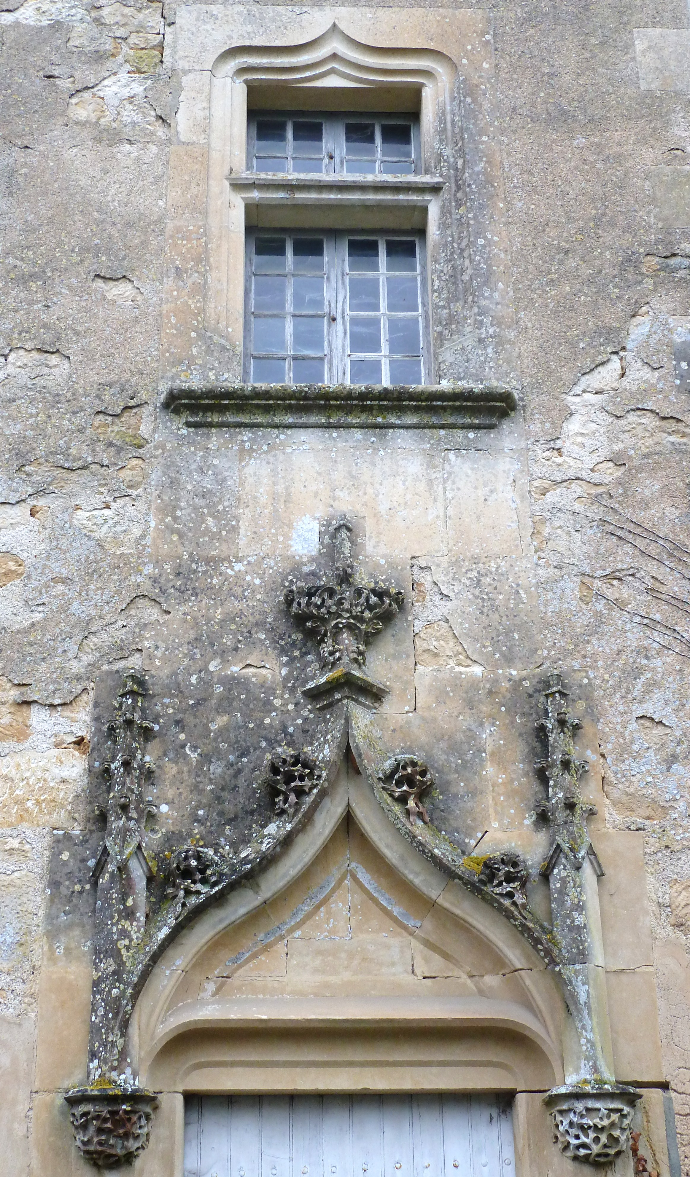 Château du bourg - Poterne